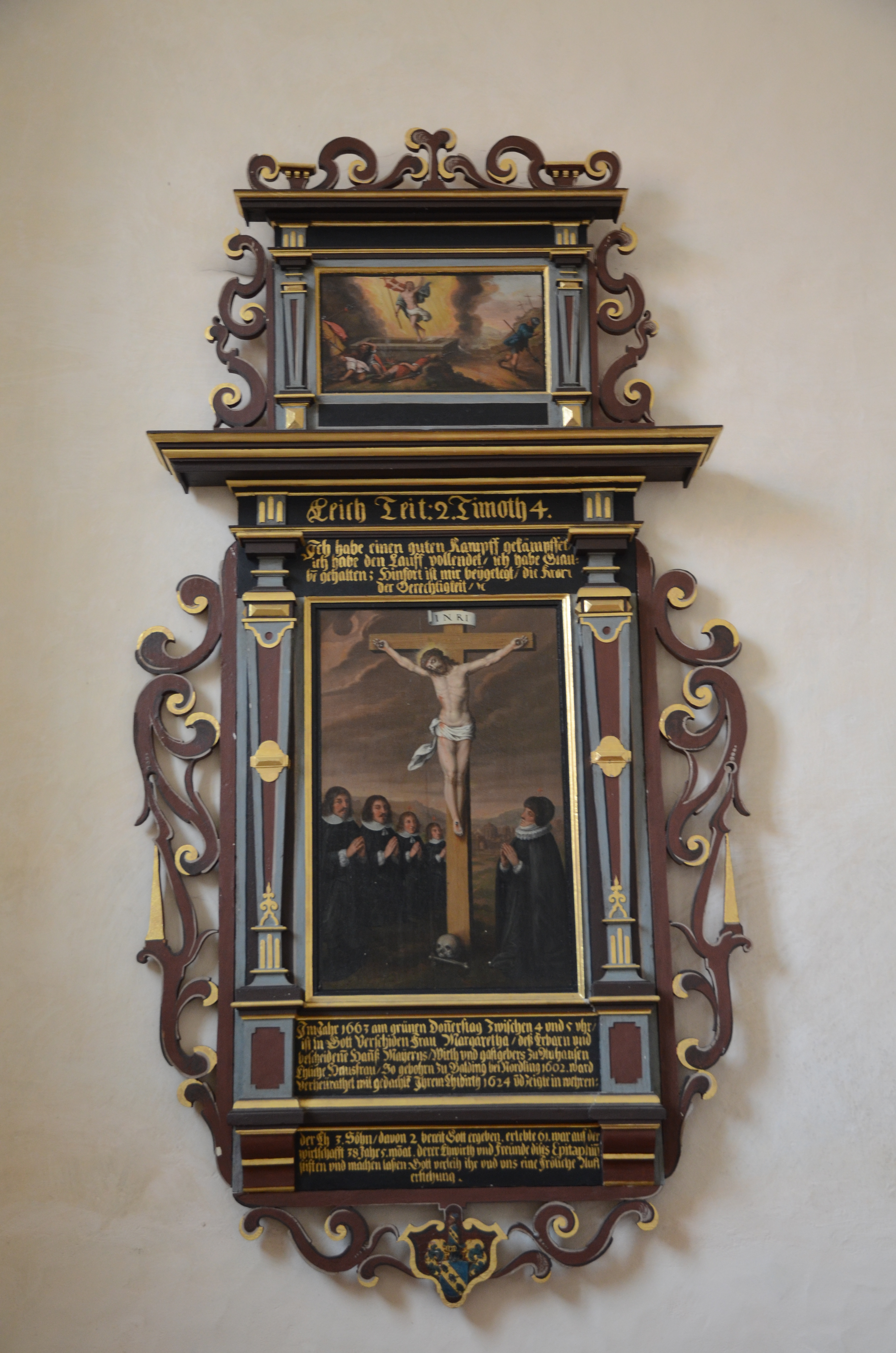 Epitaph in der ehemalige Klosterkirche St. Maria in Auhausen